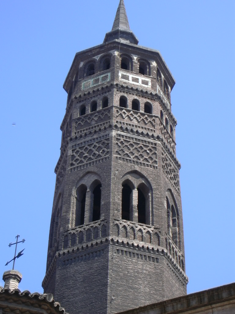 Zaragoza - San Pablo - Torre